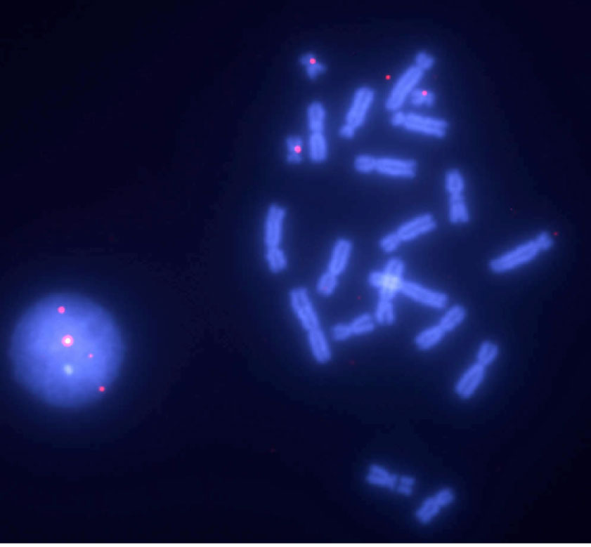 Photo de FISH sur chromosomes métaphasiques à partir de cellules speedy de Xenopus tropicalis